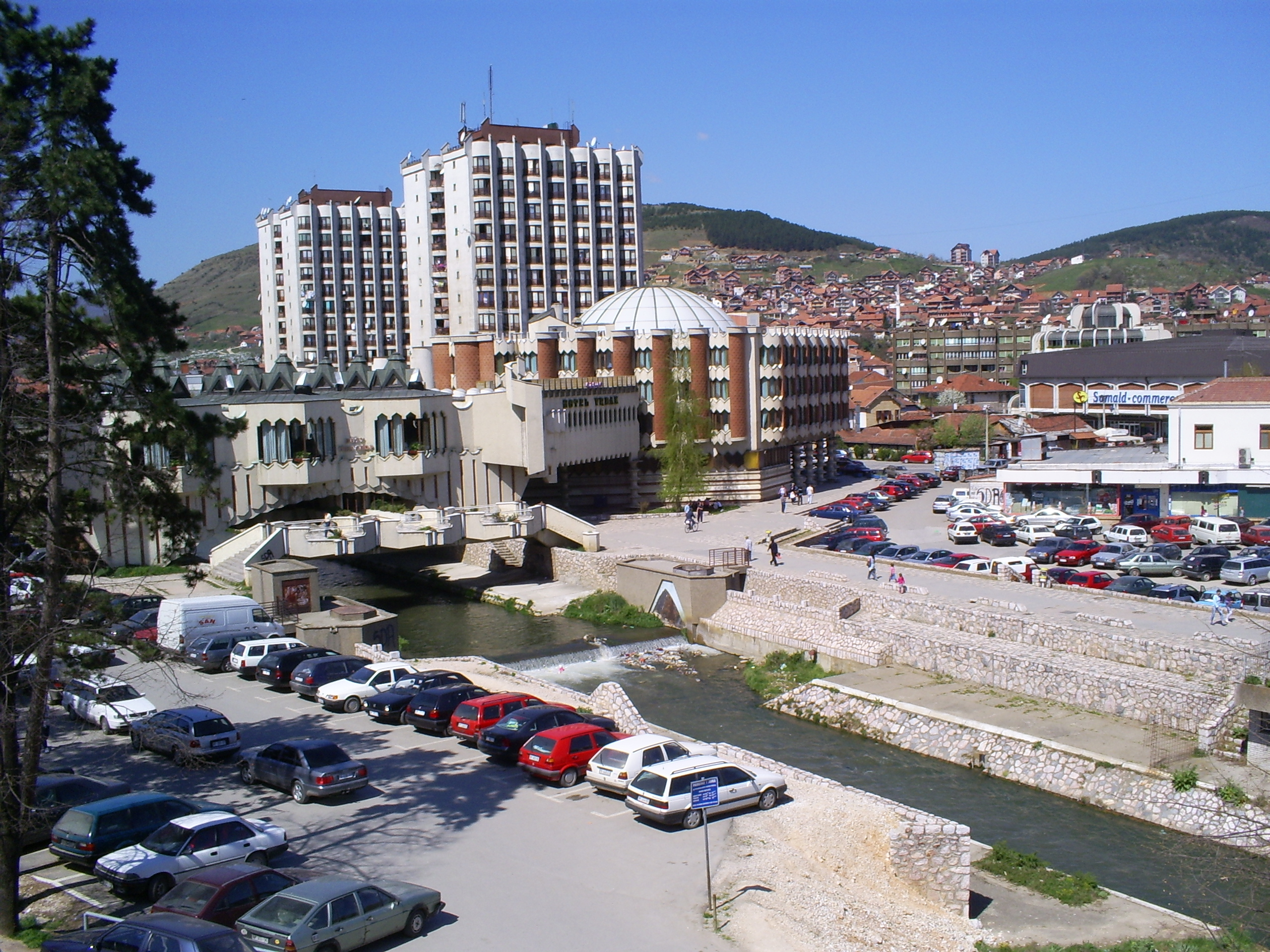 Pogled na Novi Pazar sa utvrdjenja u centru grada